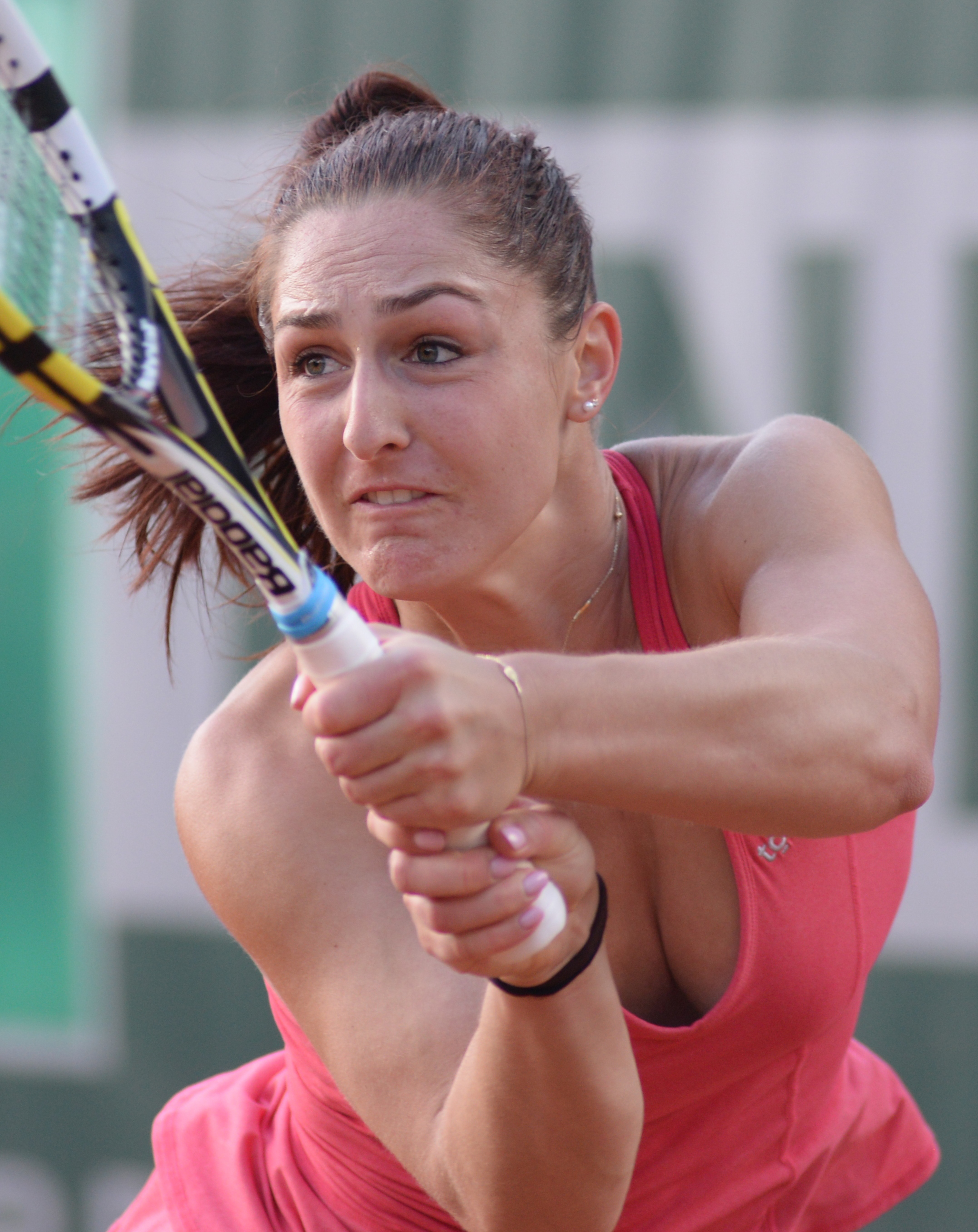 Gabriela Dabrowski